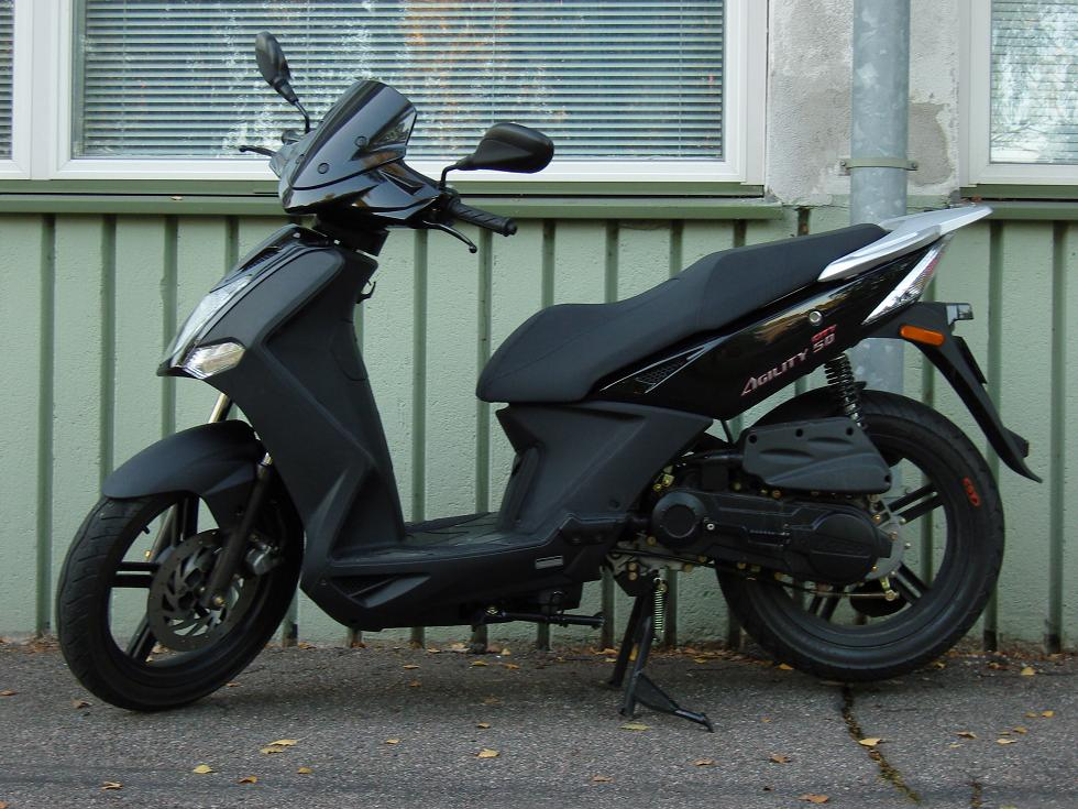 Kuva skootterista.